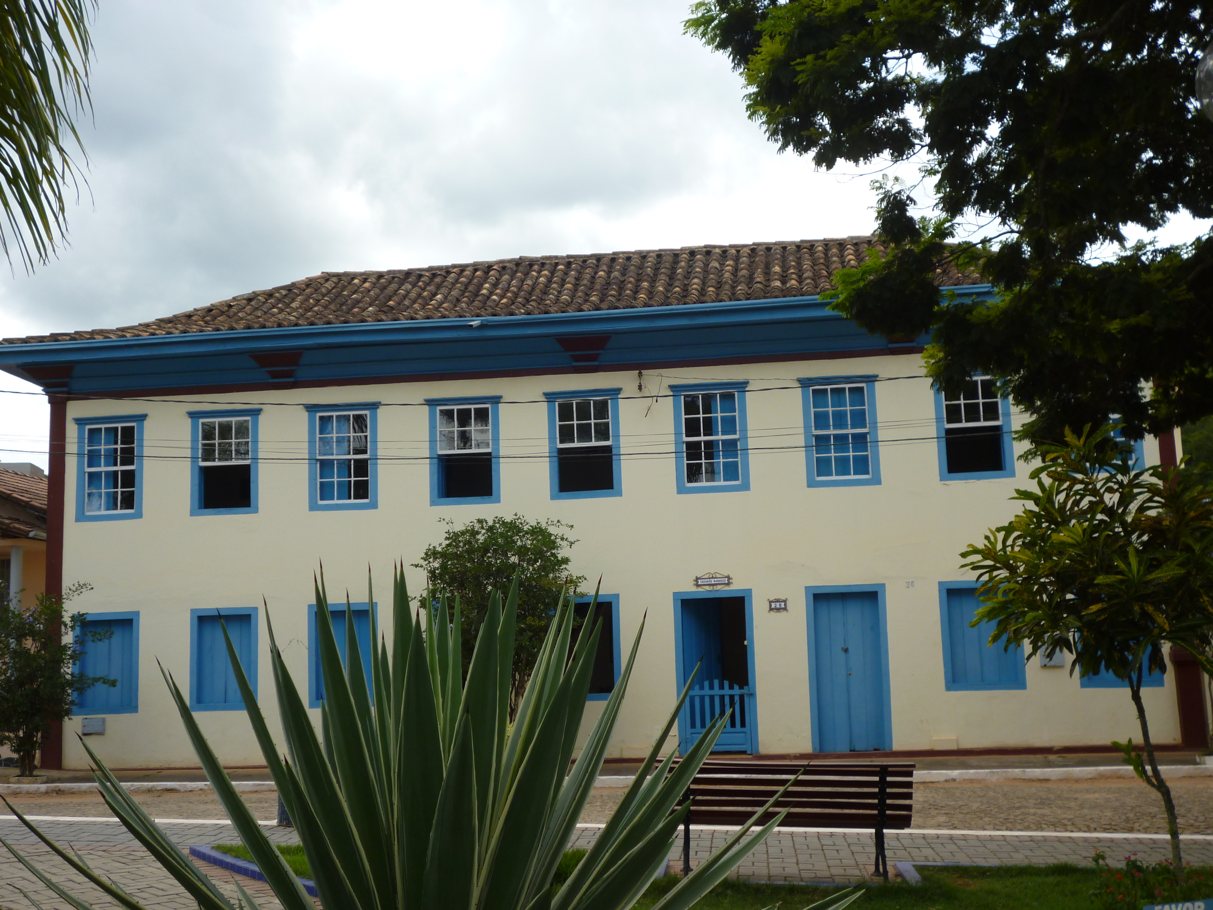 Sabinópolis MG Brasil - Sobrado Barroso, Praça da Matriz